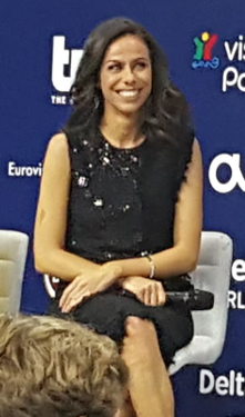 Prowadzące 63. Konkurs Piosenki Eurowizji, maj 2018